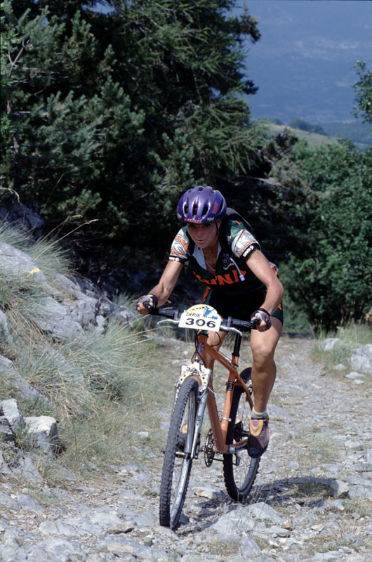 La championne de VTT Nathalie Fiat en 1994